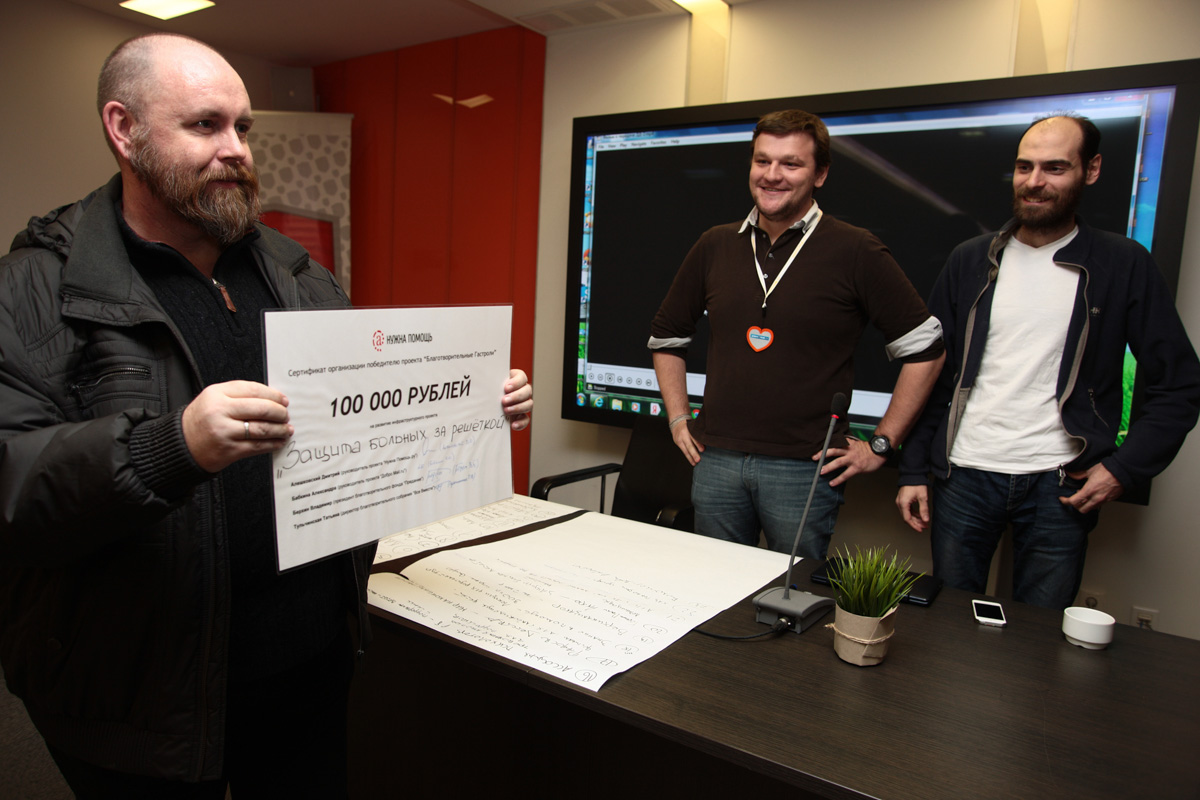 АЛЕТКИН Герман Николаевич Руководитель Центра миротворческих и правозащитных действий, г. Казань, победитель грантового конкурса проекта "Благотворительные Гастроли".